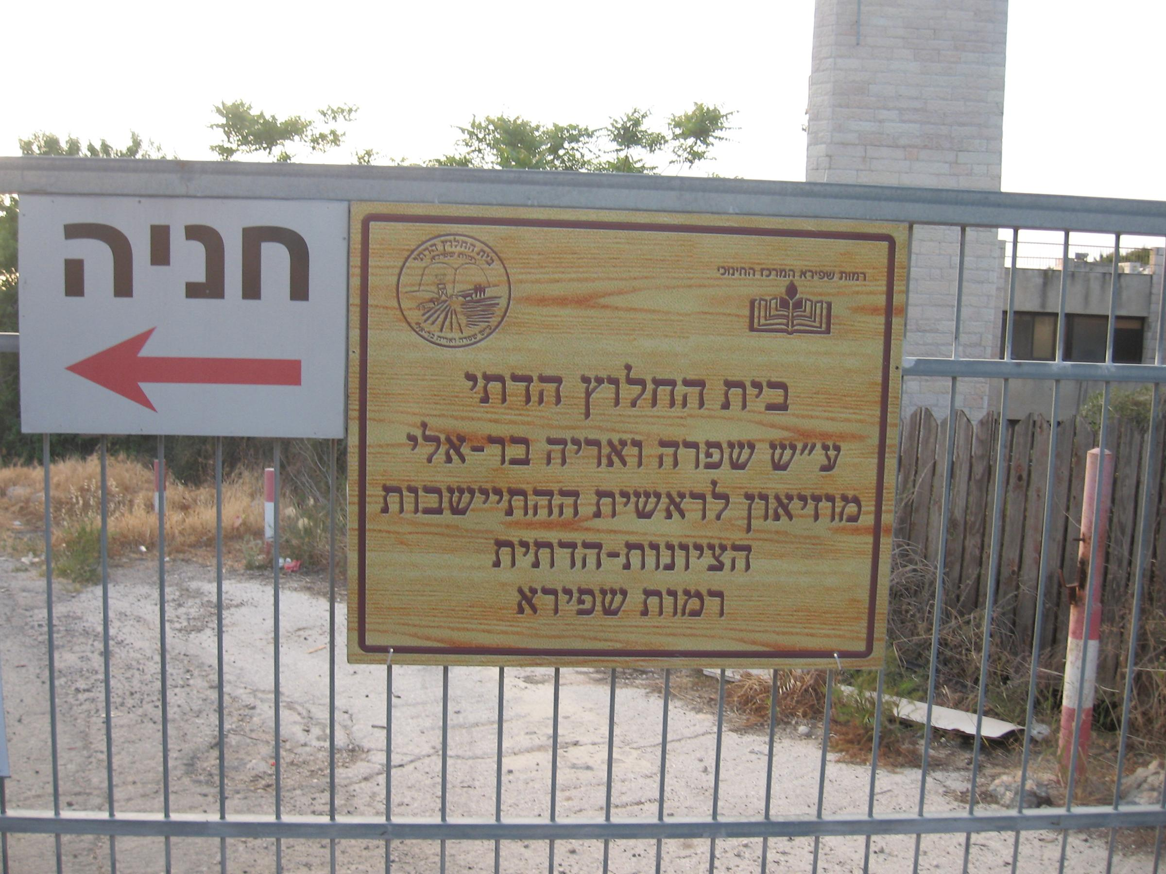 בית מאיר היום בית מחסיר בעבר